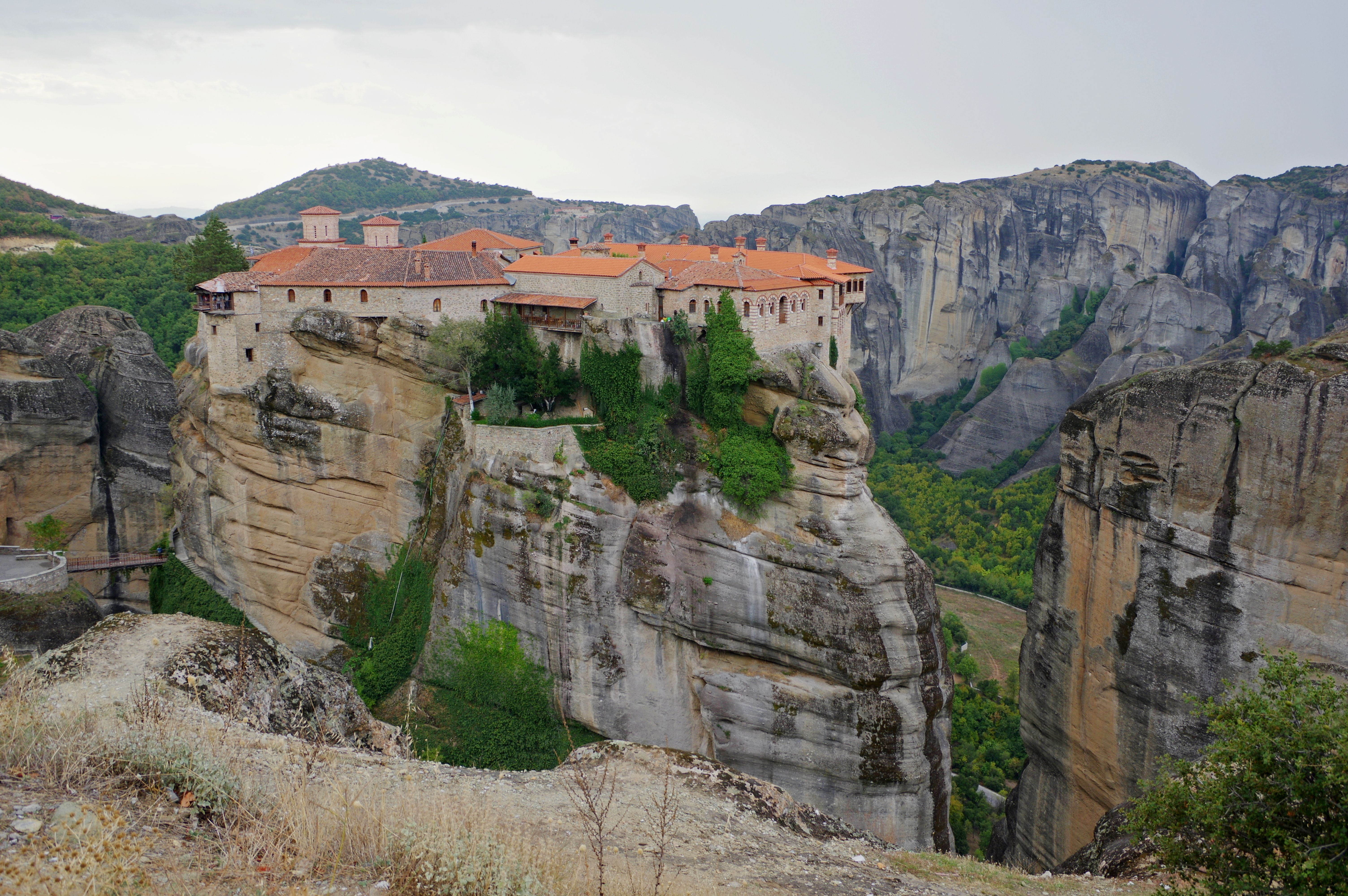 Greece, Meteora, Moni Varlaam